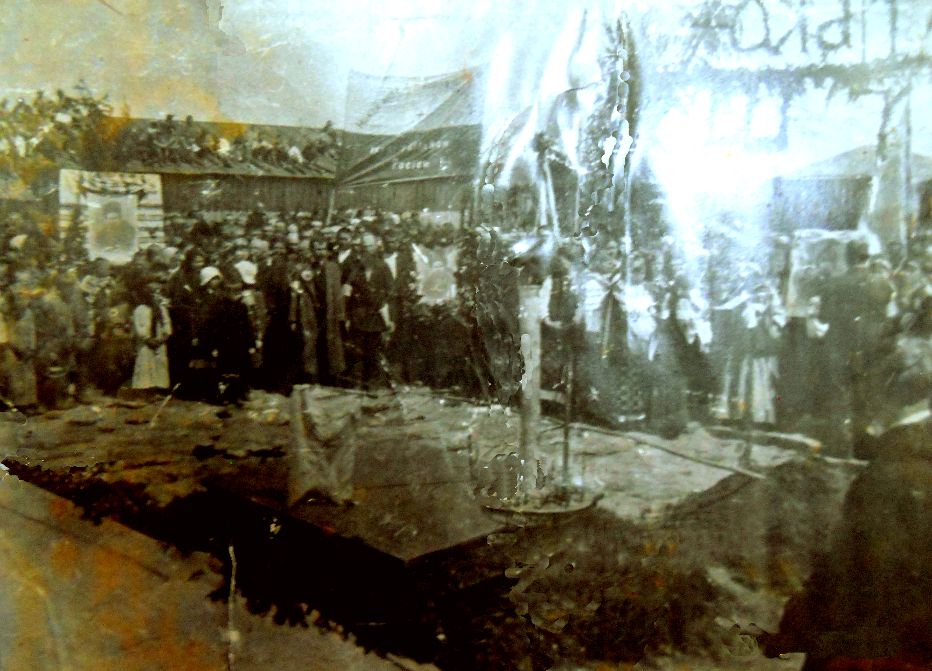 Гавронці. Мітинг в пам'ятні Шевченківські дні 9 березня 1917 року, під час якого борцями за волю і незалежність України був посаджений Дуб свободи на місці пам'ятника Олександрові II, встановленого Кочубеєм Gavrontsi. Shevchenko commemorative event March 9, 1917, during which the fighters for freedom and independence of Ukraine planted Oak of freedom instead of Alexander II monument, put Kochubei Gavrontsi. Shevchenko commémorative manifestation le 9 Mars 1917, au cours de laquelle les combattants pour la liberté et l'indépendance de l'Ukraine ont planté le Chêne de la liberté au lieu du monument d'Alexandre II, mis Kochubei